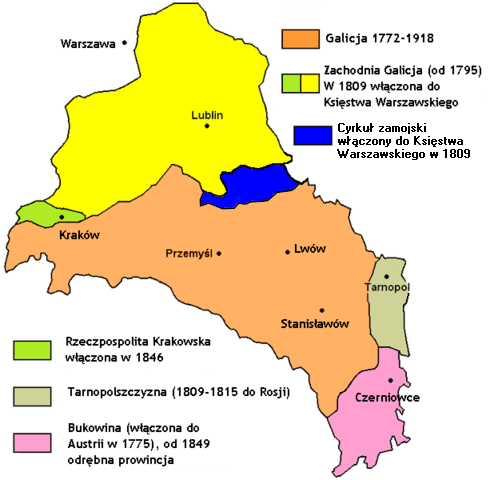 spolonizowany plik Kingdom_of_Galicia.png z Commons